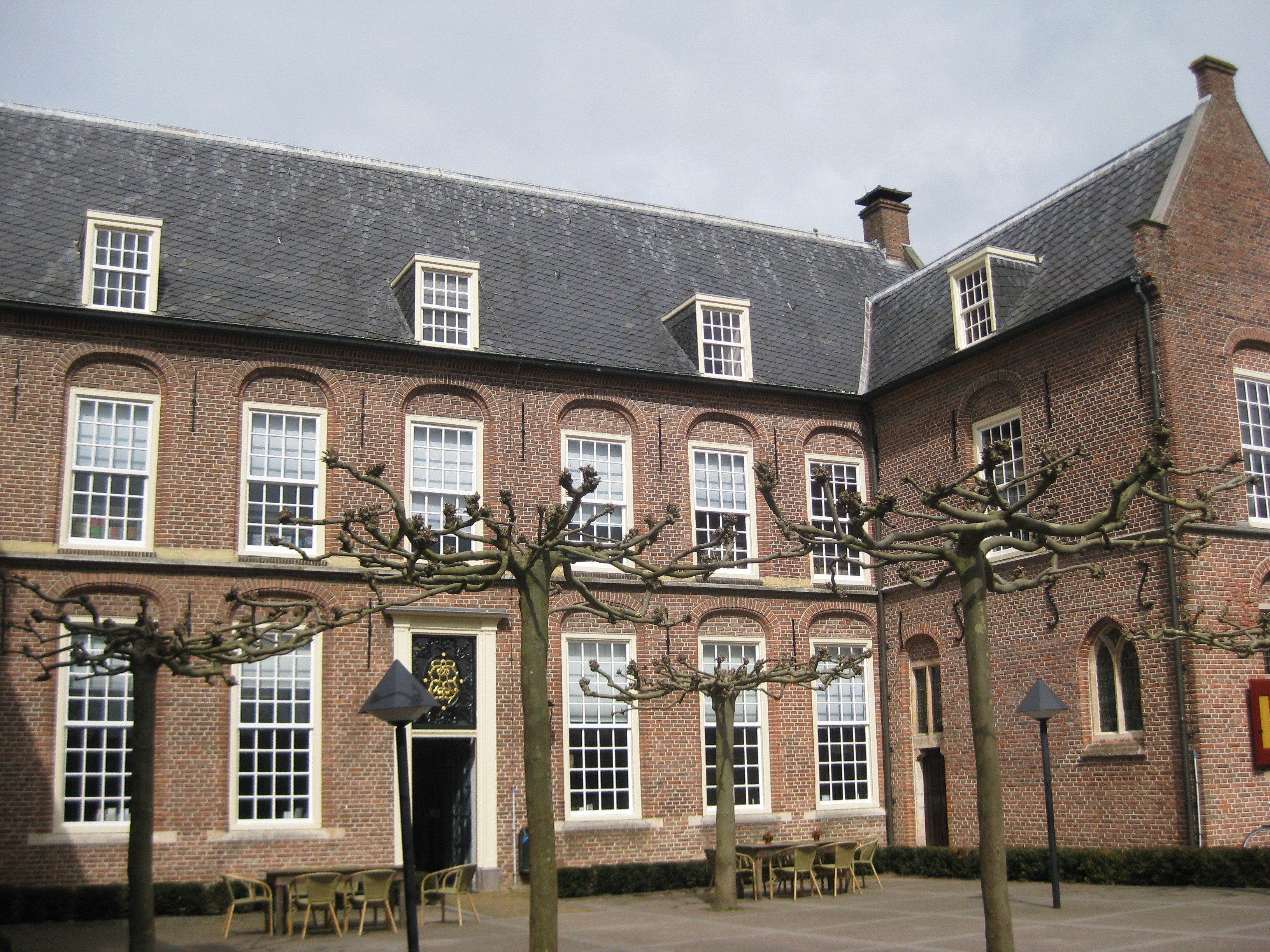 Elisabethweeshuis, Herenstraat in Culemborg